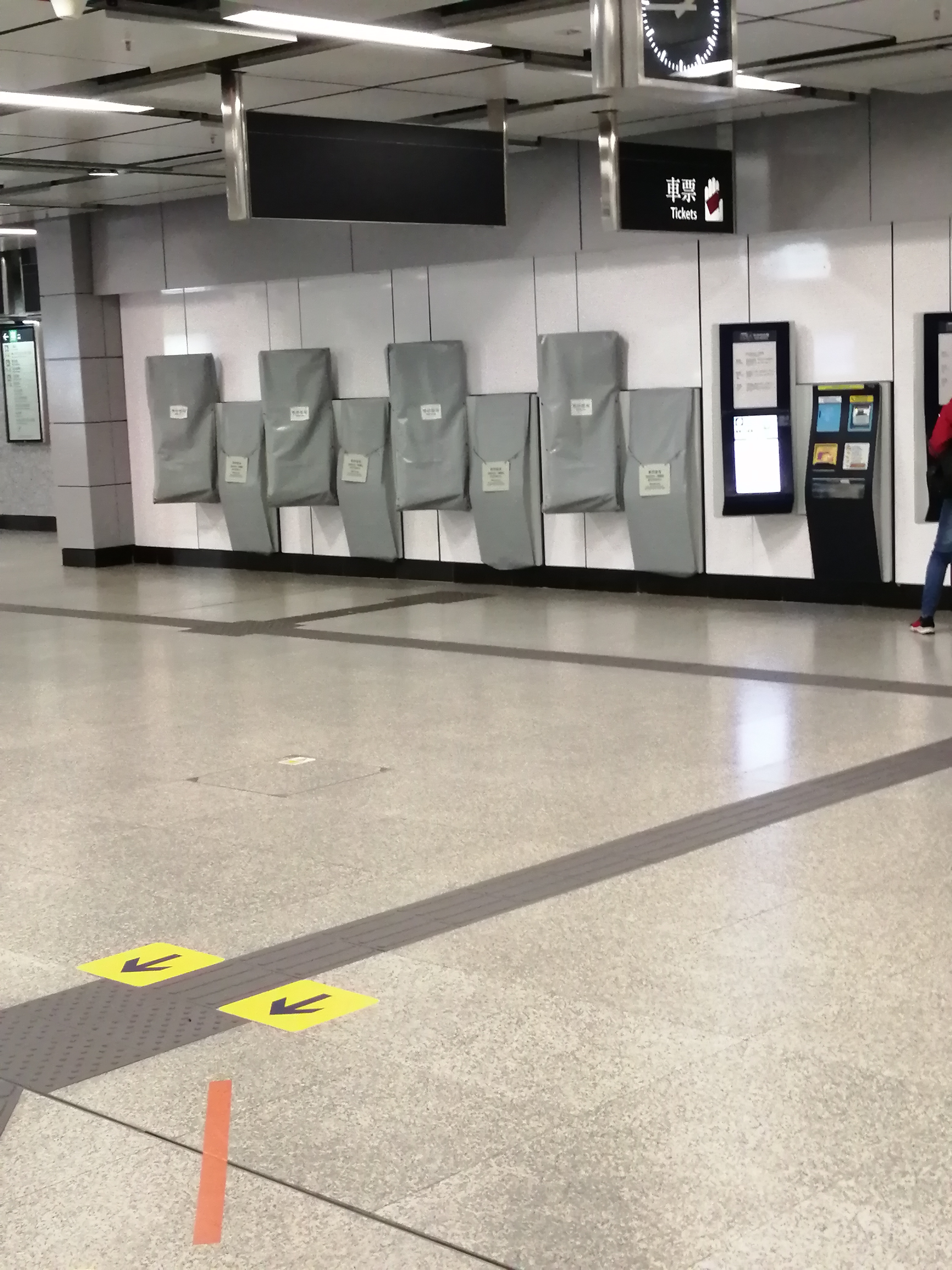 中文（香港）: 何文田站遭到破壞的售票機